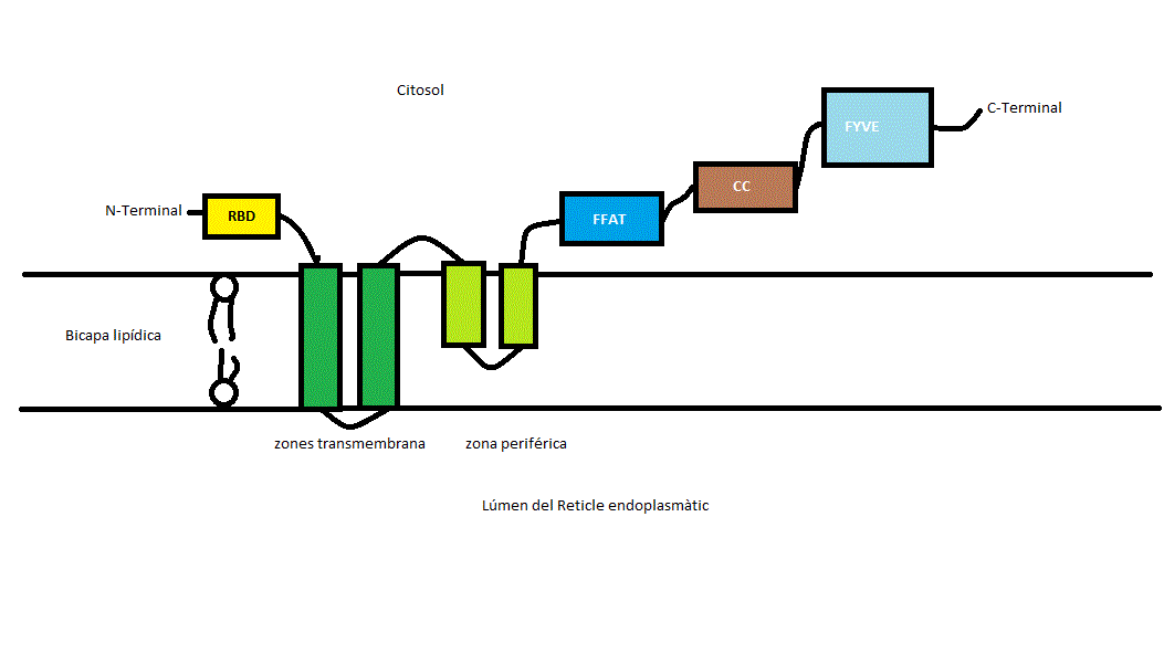 Un sencill esquema que permet localitzar els diferents dominis estructurals de la proteïna